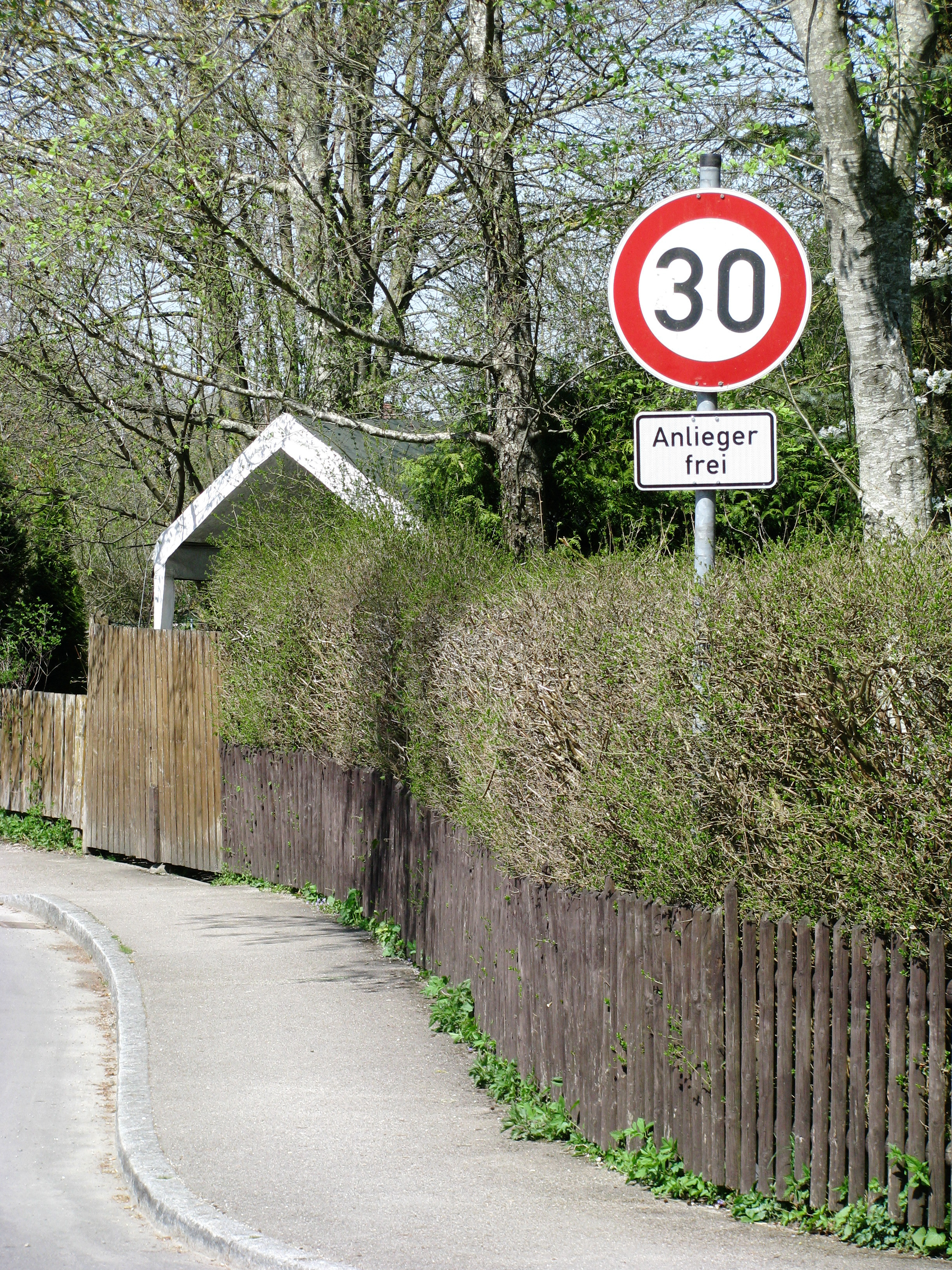 Schild zur Geschwindigkeitsbeschränkung in der Straße Am Schloßpark in Windach, Anlieger dürfen schneller fahren